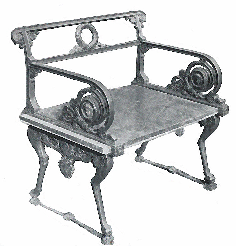 Eisenkunstgusssessel Klein Glienicke um 1830